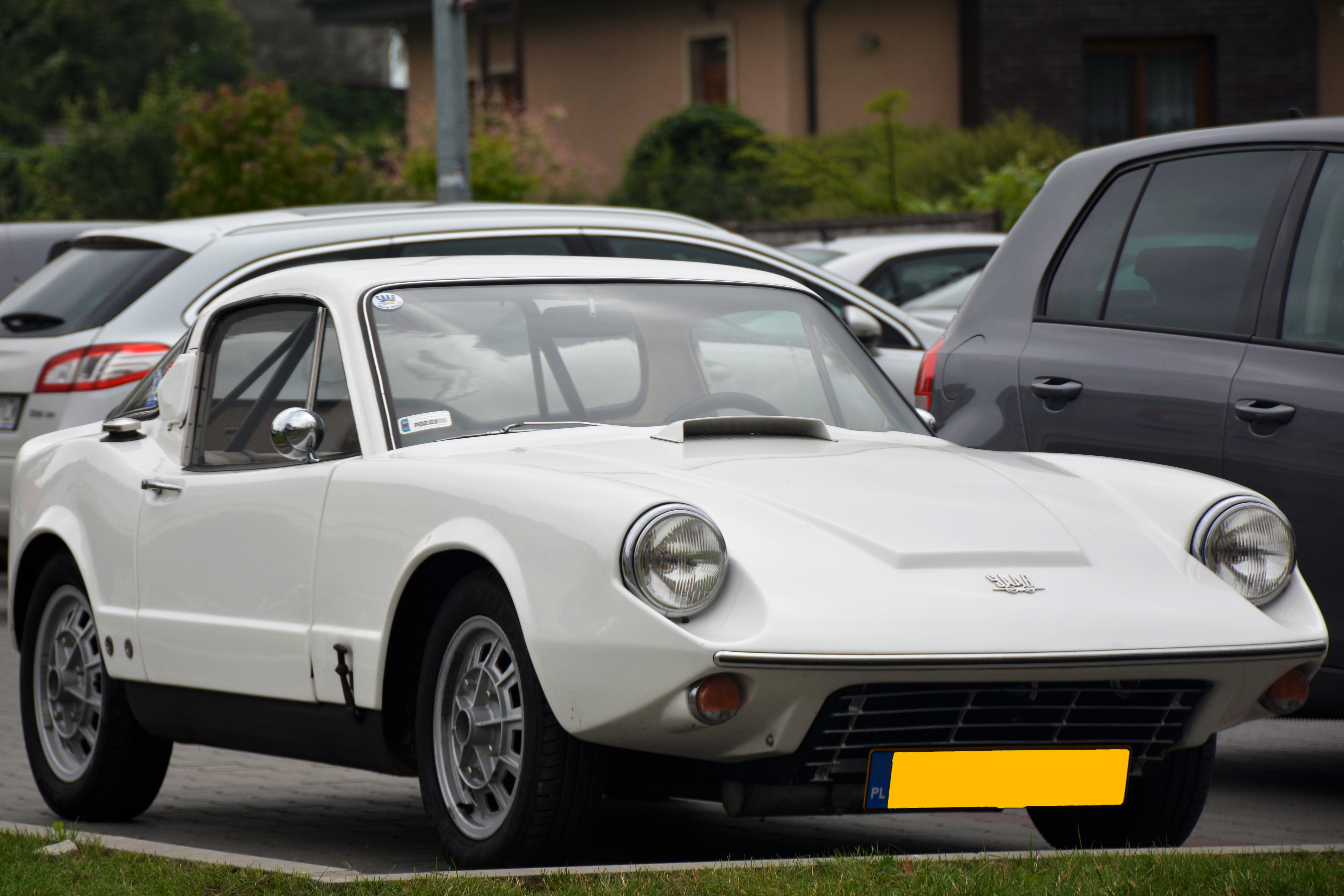 Saab 97